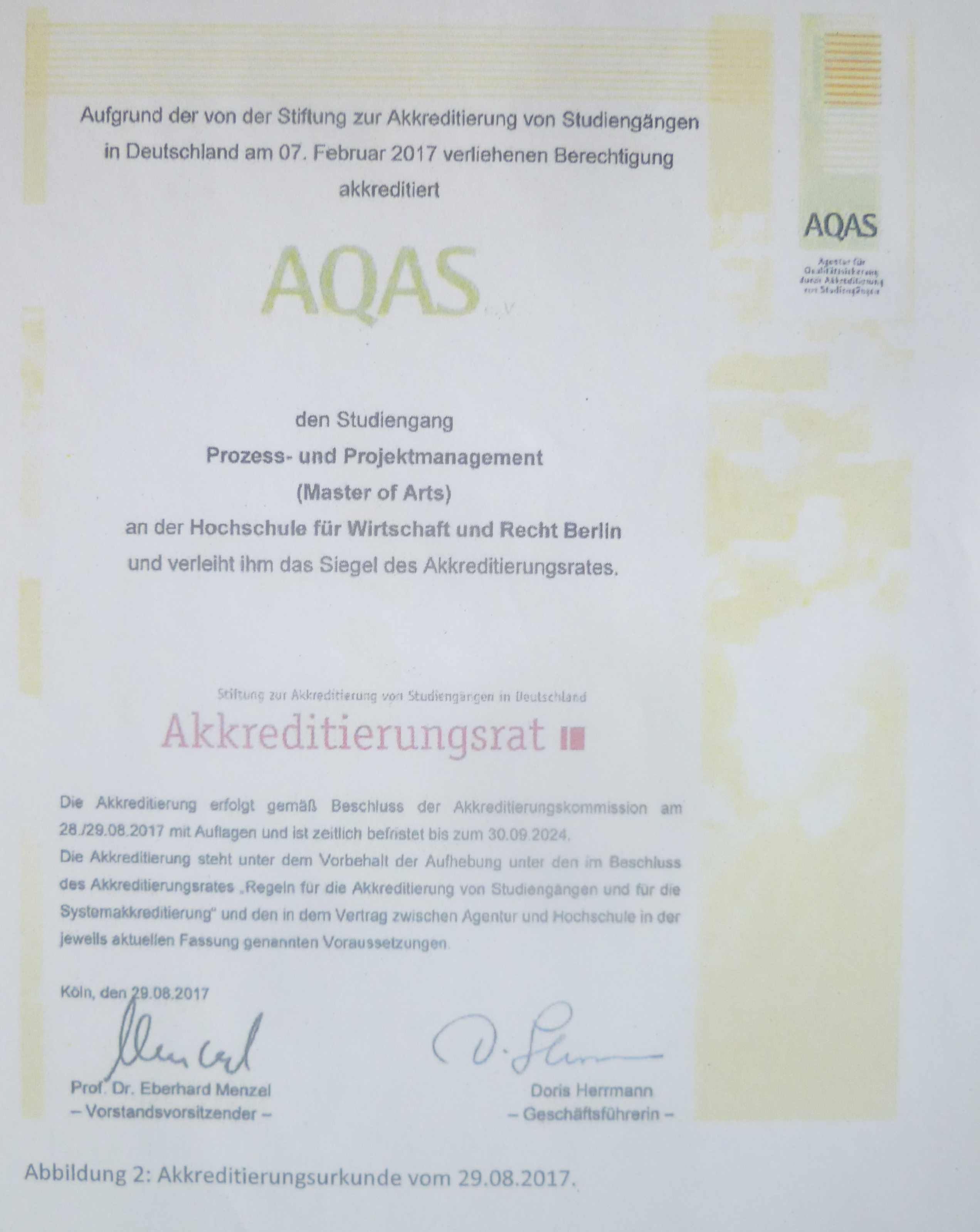 Akkreditierungsurkunde